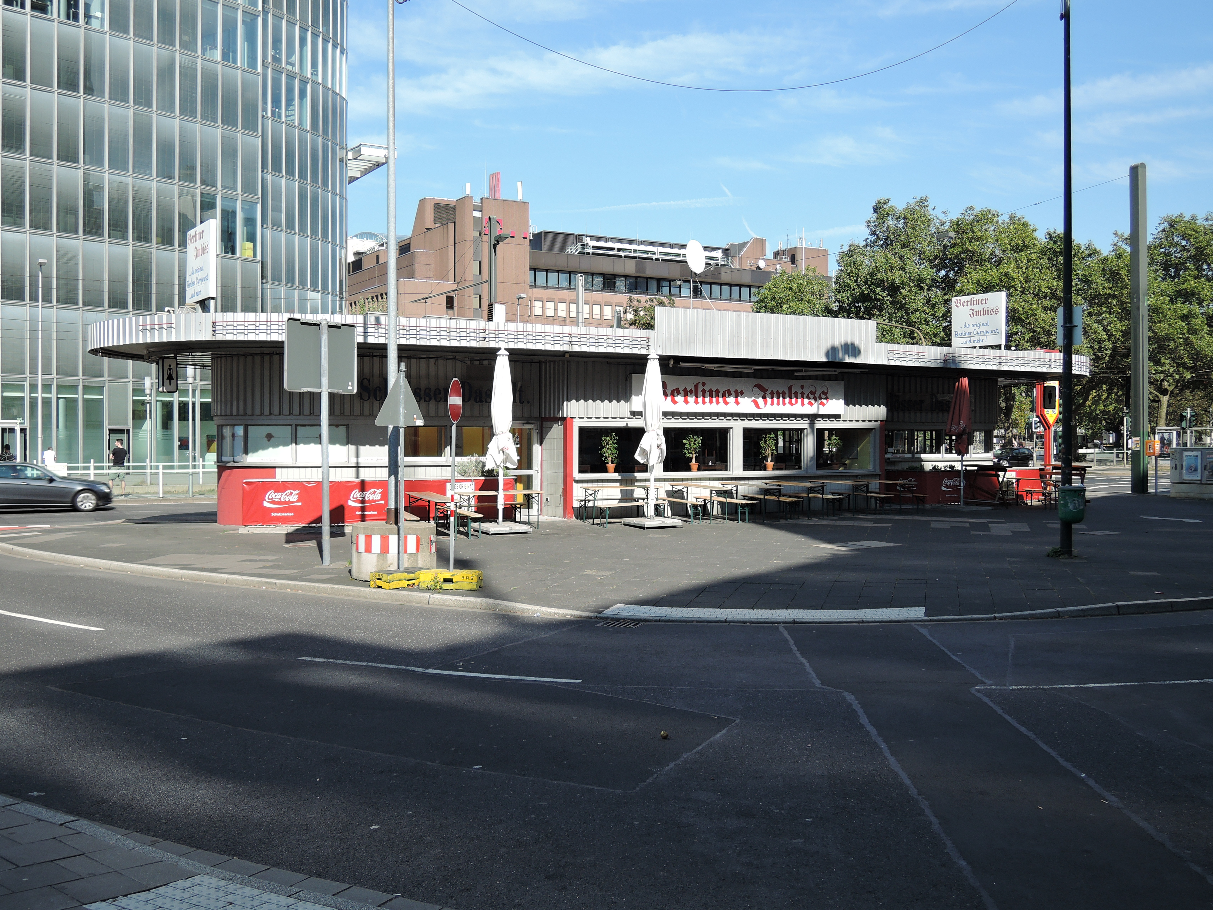 "Berliner Imbiss" am Graf-Adolf-Platz in Düsseldorf